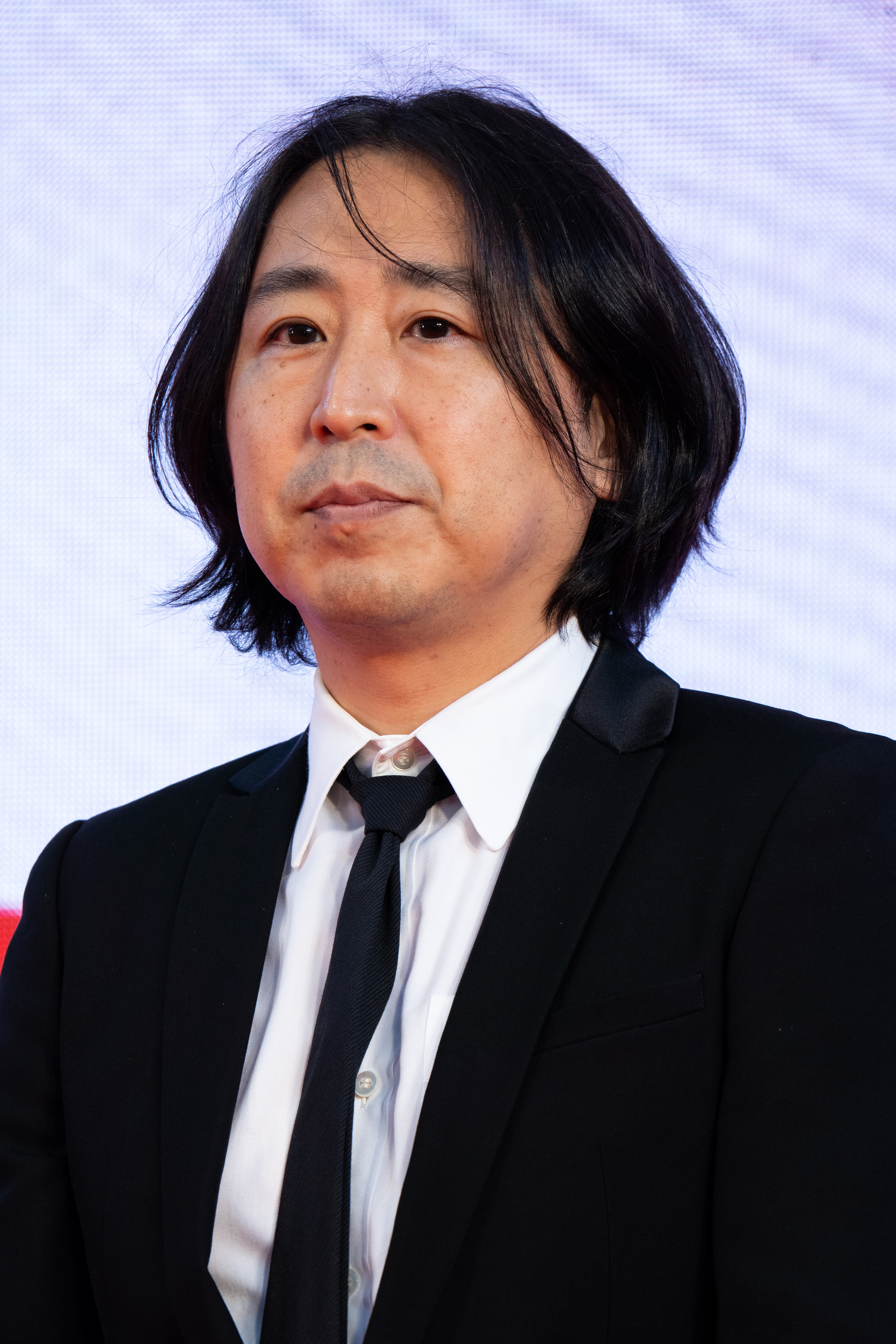 第32回 東京国際映画祭 オープニングセレモニー 小林啓一 (殺さない彼と死なない彼女)